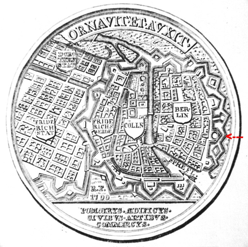 Medaille mit einer Ansicht der Stadt Berlin um 1700